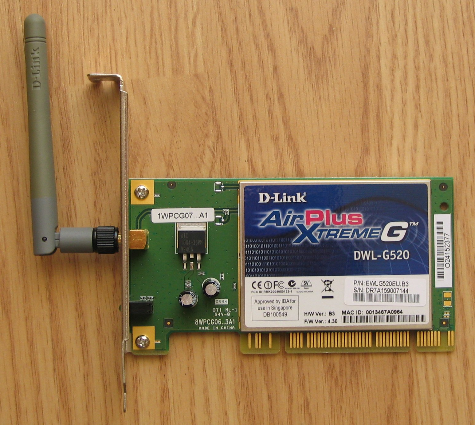 D-Link WLAN PCI Card DWL-G520